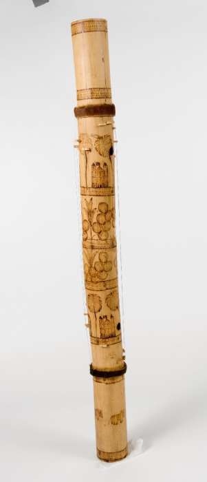 Deze valiha, die oorspronkelij uit Zuid Oost Azië. komt , is een van de oudste instrumenten op Madagascar en is daar een symbool van de culturele identiteit geworden. De valiha werd aanvankelijk gespeeld bij rituelen van religieuse aard maar wordt tegenwoordig ook voor wereldlijke muziek gebruikt. Volgens traditionele orale bronnen zou de valiha, met name in Imerina, oorspronkelijk in adelijke kringen worden bespeeld en dan uitsluitend door mannen. Tegenwoordig is het zeer gebruikelijk dat de valiha door een vrouw wordt bespeeld.